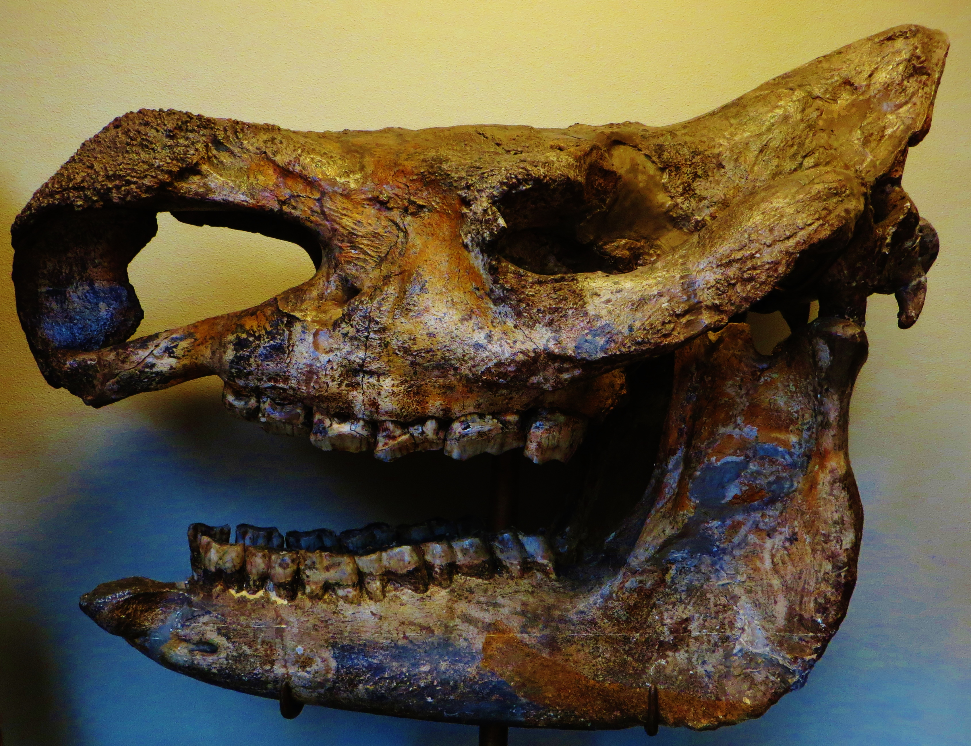 Fossil of Stephanorhinus, an extinct mammal- Took the photo at Musee d'Histoire Naturelle, Paris